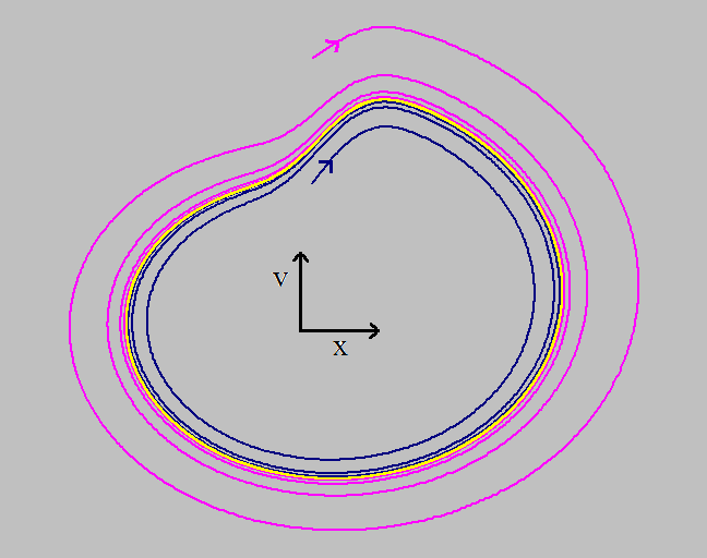 Limietcykel van een eenvoudige aangedreven slinger